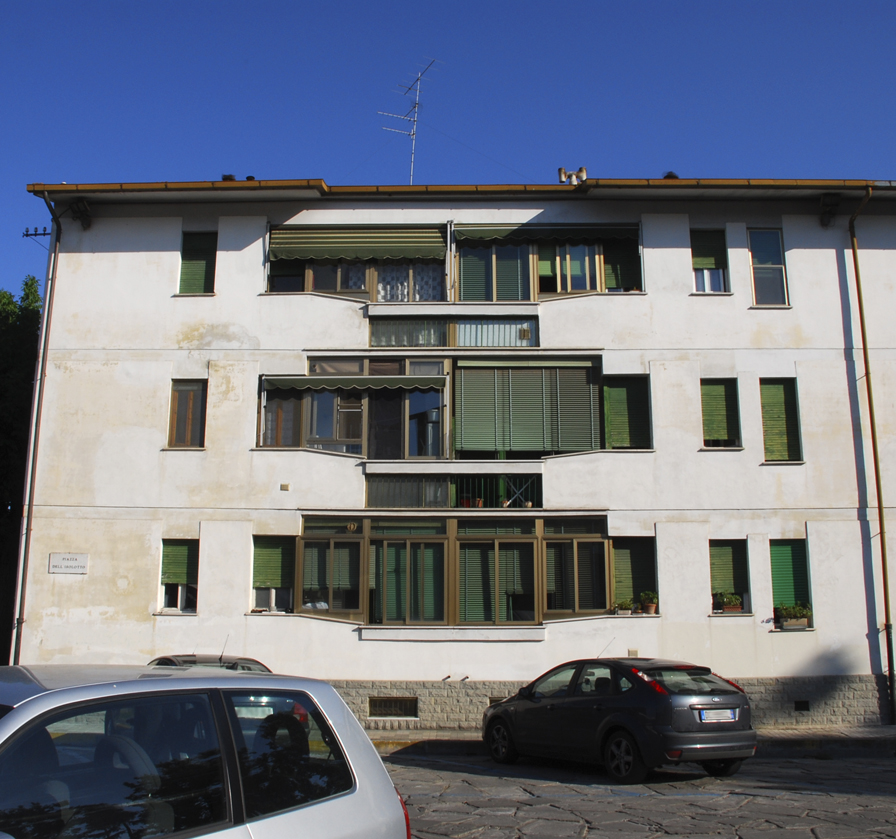 Isolotto (quarter), Florence, Italy. Piazza dell'Isolotto: Building.